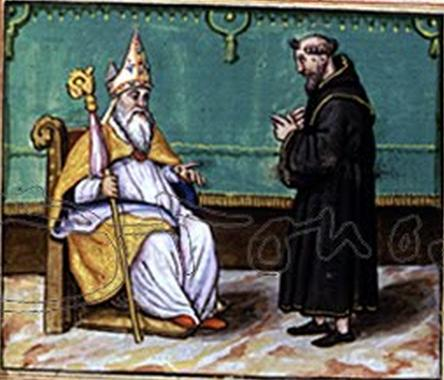 Miniatura contenuta nel ' 'folio 91' ' del testo arabo di Ibn Zafar al Siquilli, tradotto in "Consolazione e intrattenimento di Califfi e di Re" , e considerato da alcuni autori come il precursore de "Il principe" dell'autore italiano Machiavelli